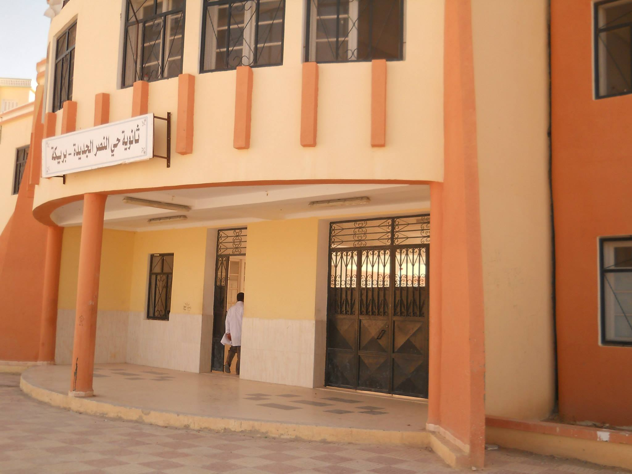 صورة لثانوية بريكة .....ثانوية حي النصر الجديدة بريكة باتنة